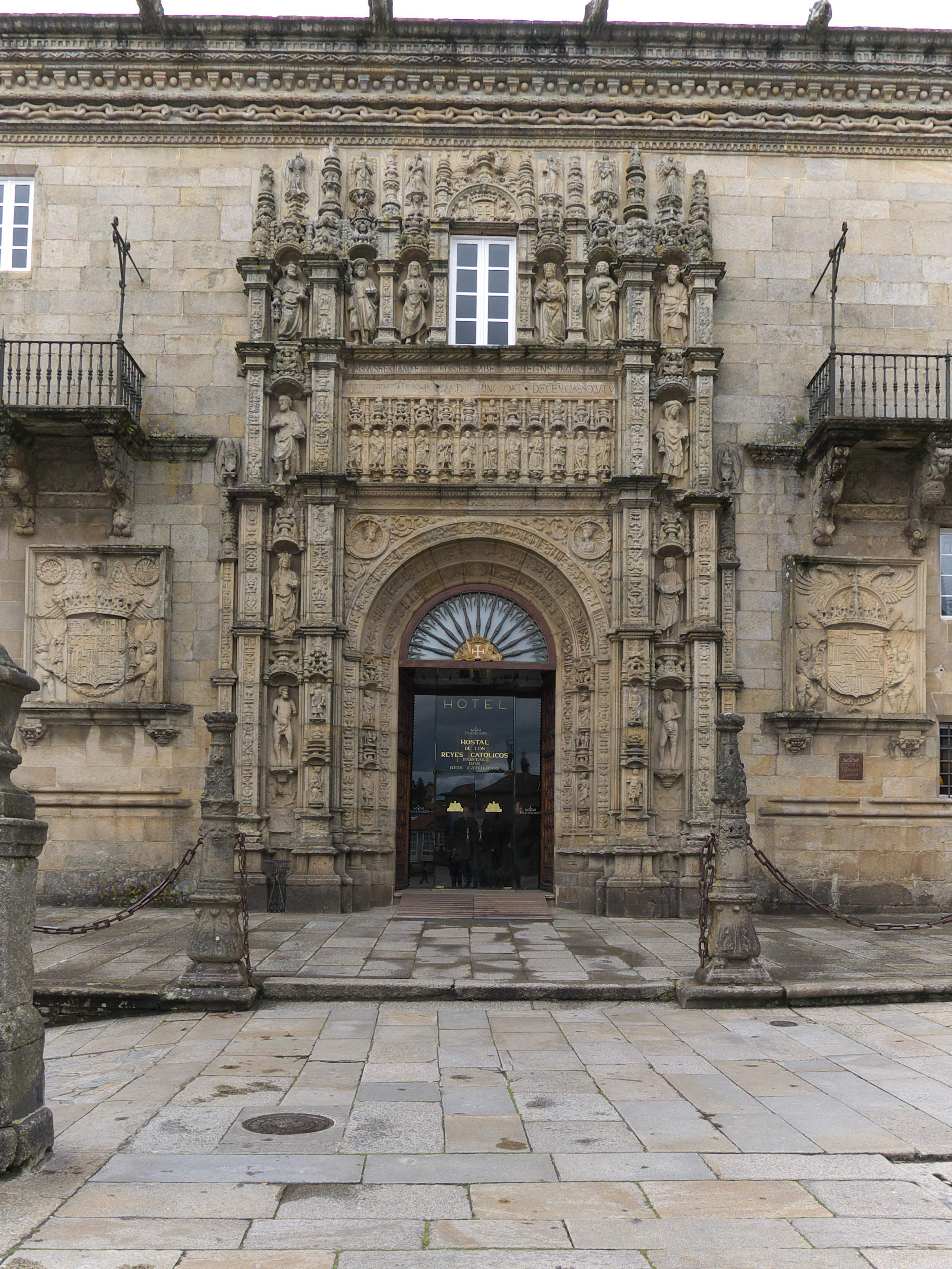 Desarrollada durante la últimas fases de construcción de la obra (1519). En su estilo predomina el rencentista con un amplio programa iconográfico muy bien ejecutado por los franceses Martín de Blas y Guillén Colás.